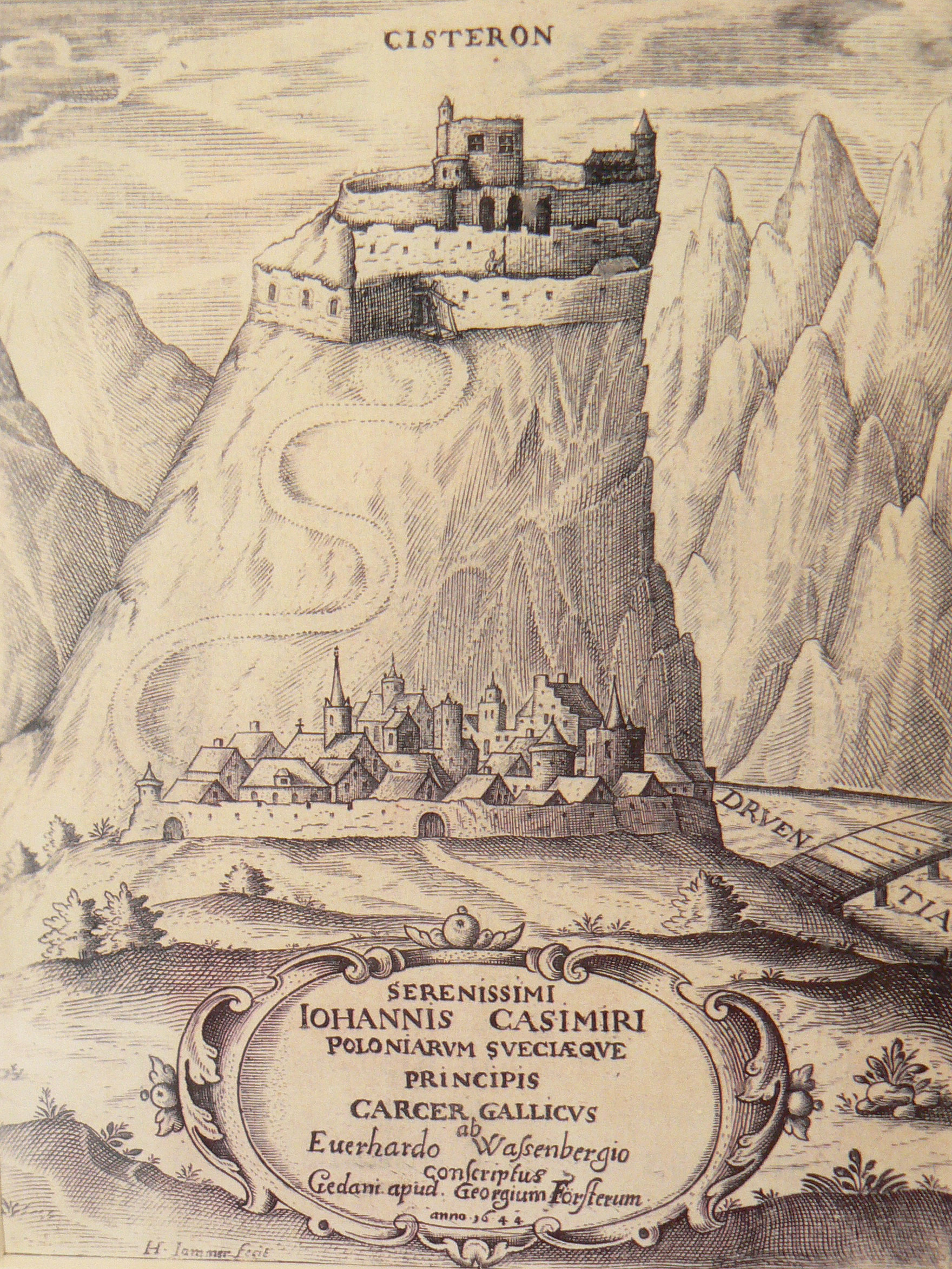 Sisteron. Vue imaginaire de la citadelle et de la ville en 1644.